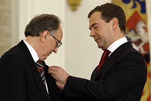 Дмитрий Медведев, Дмитрий Варшалович